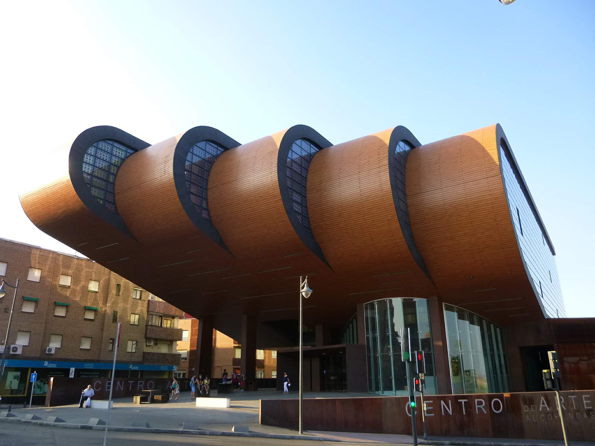 Centro de Arte Alcobendas (Alcobendas, Madrid)